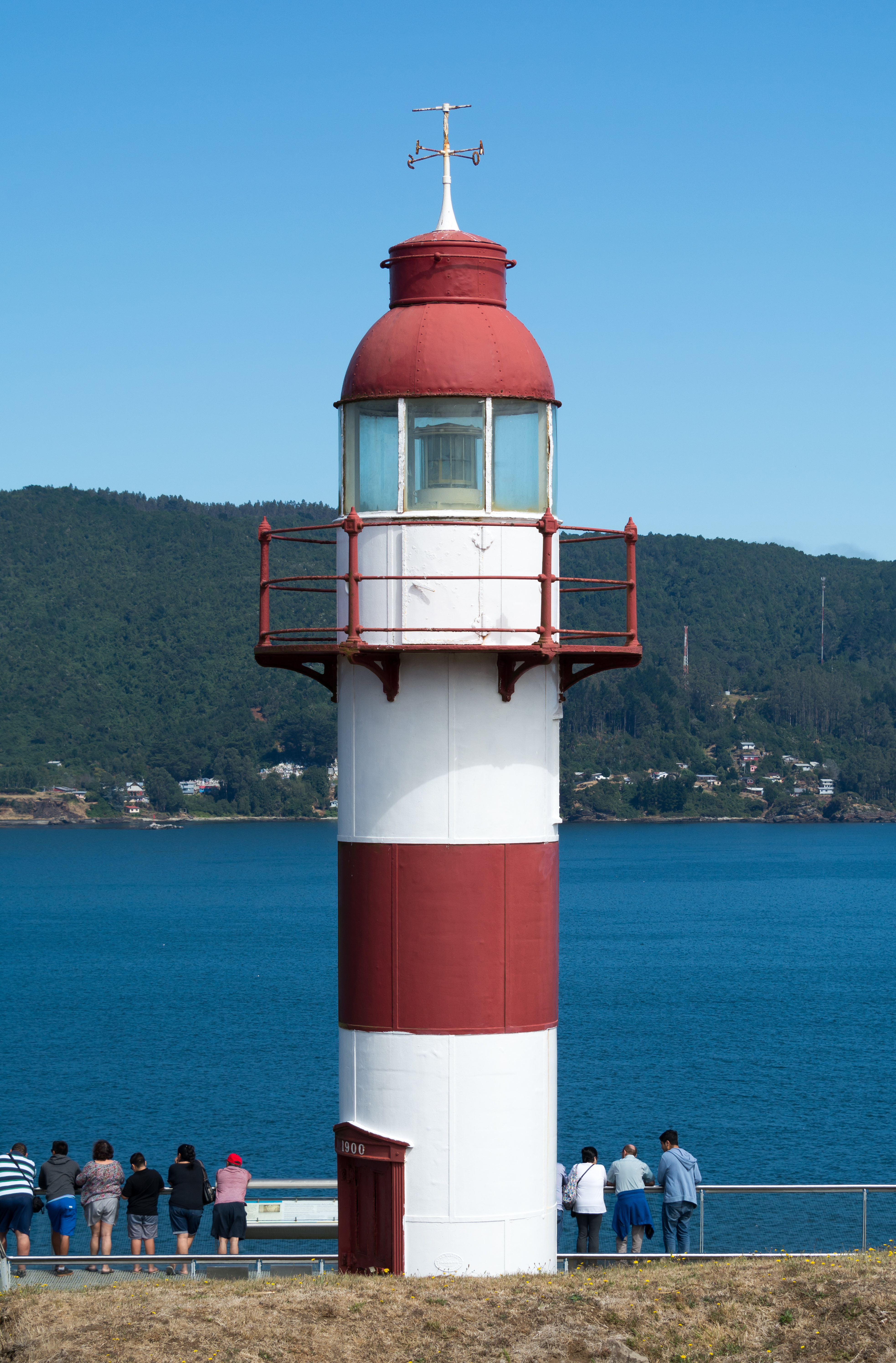 Faro Morro Niebla, Niebla, Región de Los Ríos, Chile